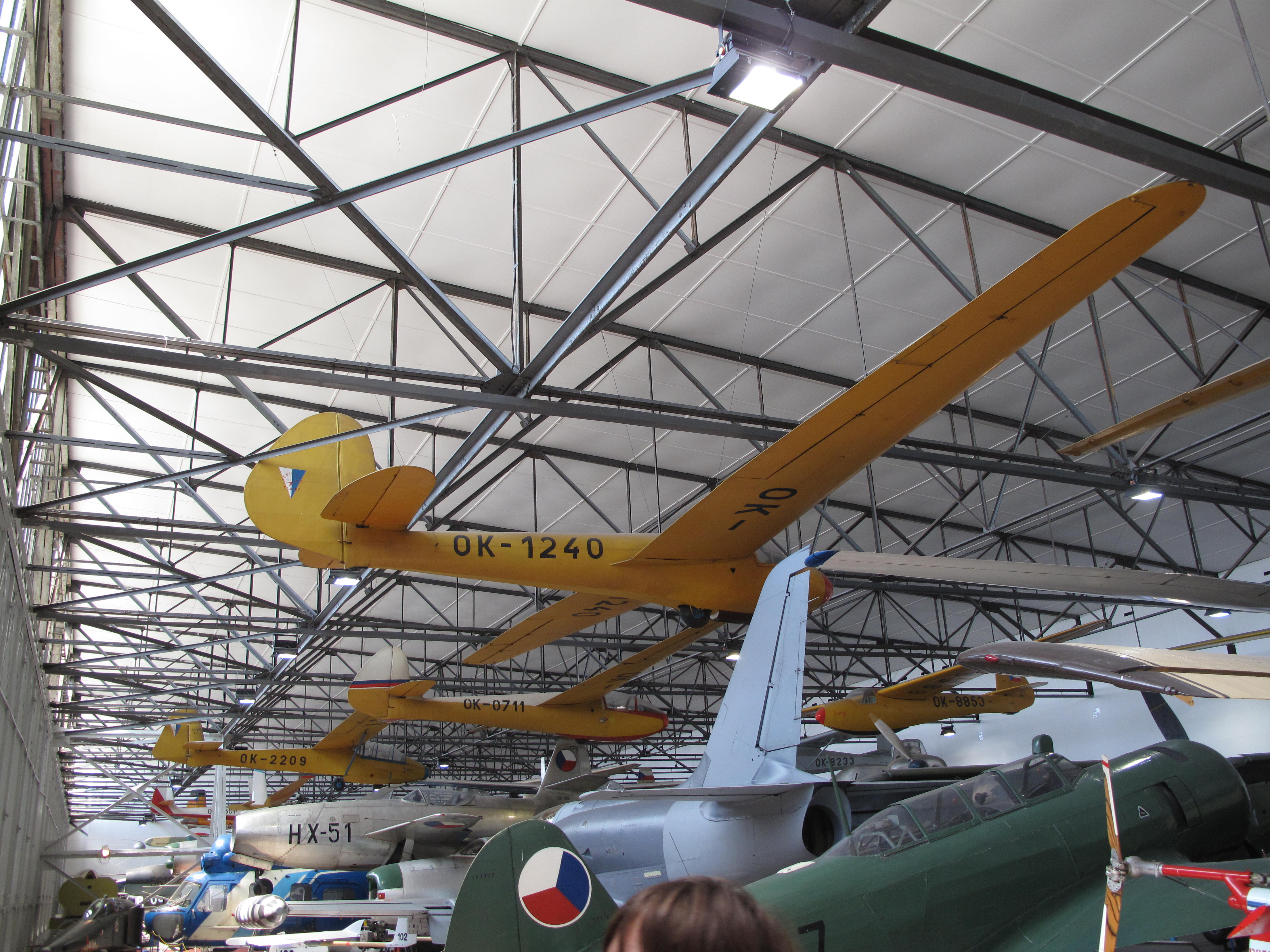 Letecké muzeum Kbely;OK-1240 . Zlin LG-130 Kmotr